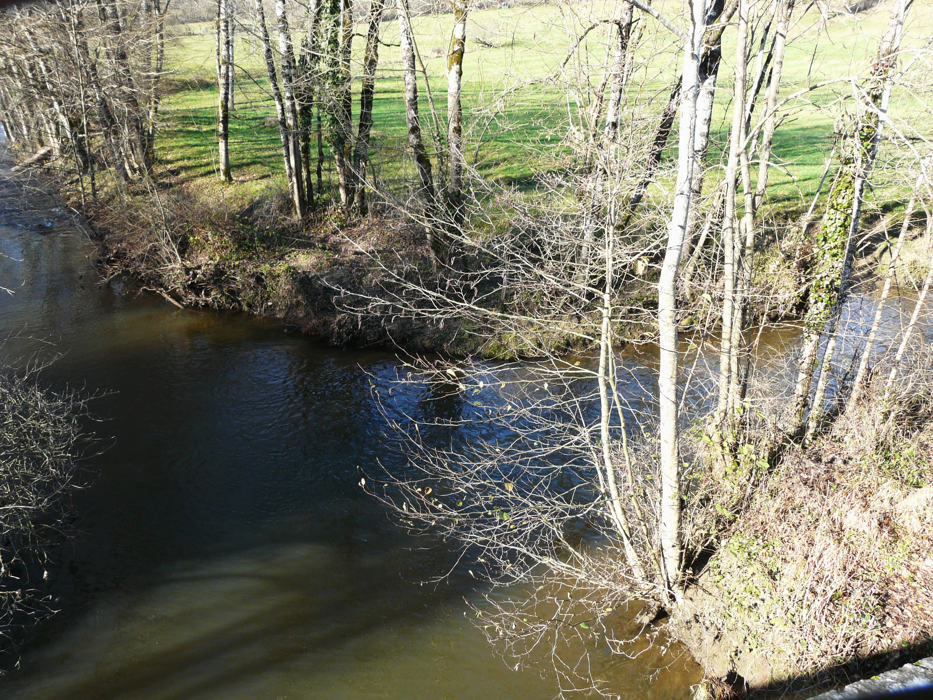 Confluent du ruisseau la Queue d'âne (arrivant de la droite) et de la rivière Côle, Pont de Lavaud, Saint-Jean-de-Côle, Dordogne, France